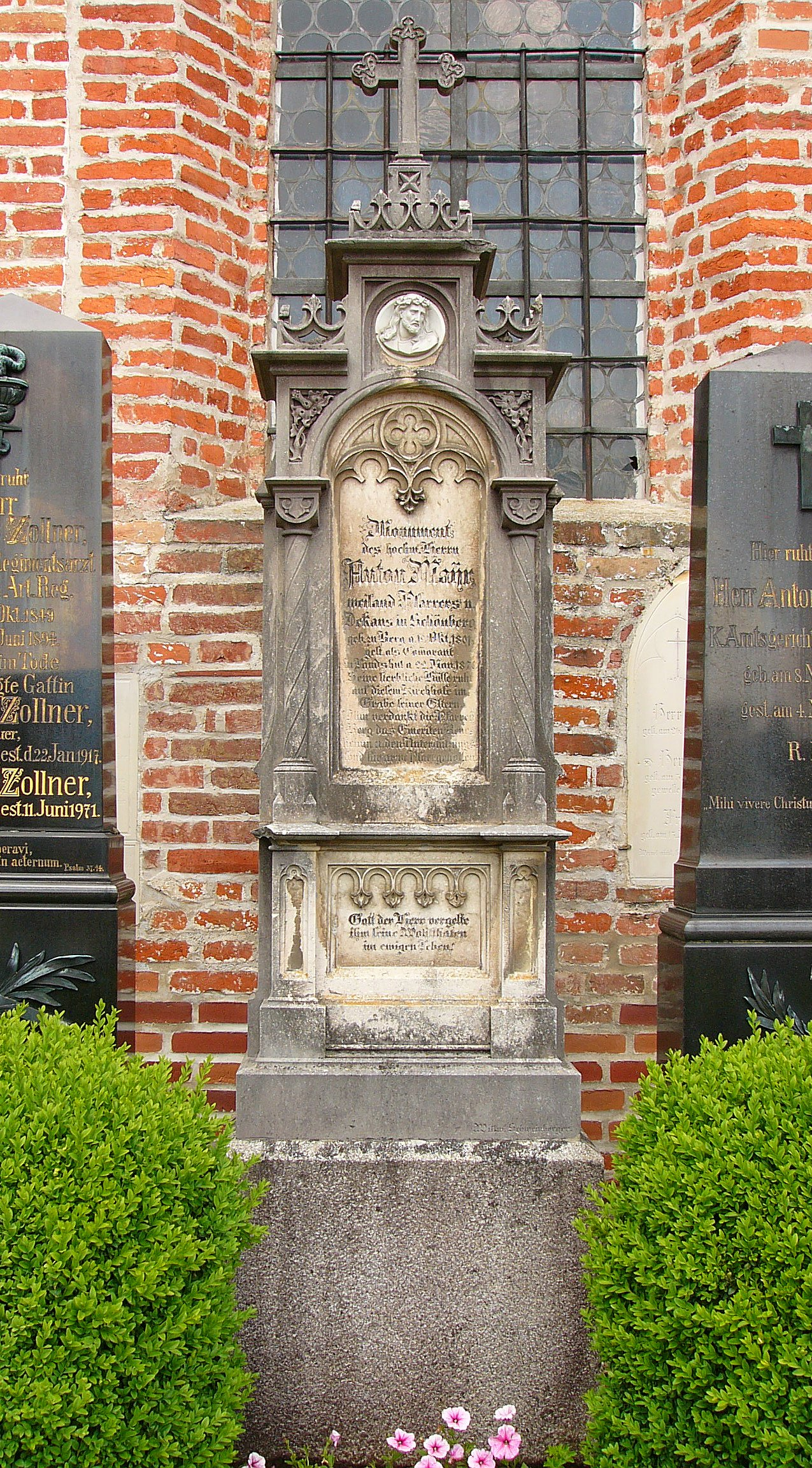 Kath. Pfarrkirche Hl. Blut einschiffige, gewölbte Anlage, spätgotisch, Mitte 15. Jh., an der Westseite Vorhalle und zwei runde Flankentürme; mit Ausstattung; Friedhofsummauerung, wohl im Kern noch spätmittelalterlich; Leichenhalle, 2. Hälfte 19. Jh.; Grabmal des Pfarrers Anton Mayr, neugotisch von Wilhelm Schweinberger 1870; vor der Kirche Wasserbecken mit schmiedeeisernem Gitter, 19. Jh.This is a photograph of an architectural monument.